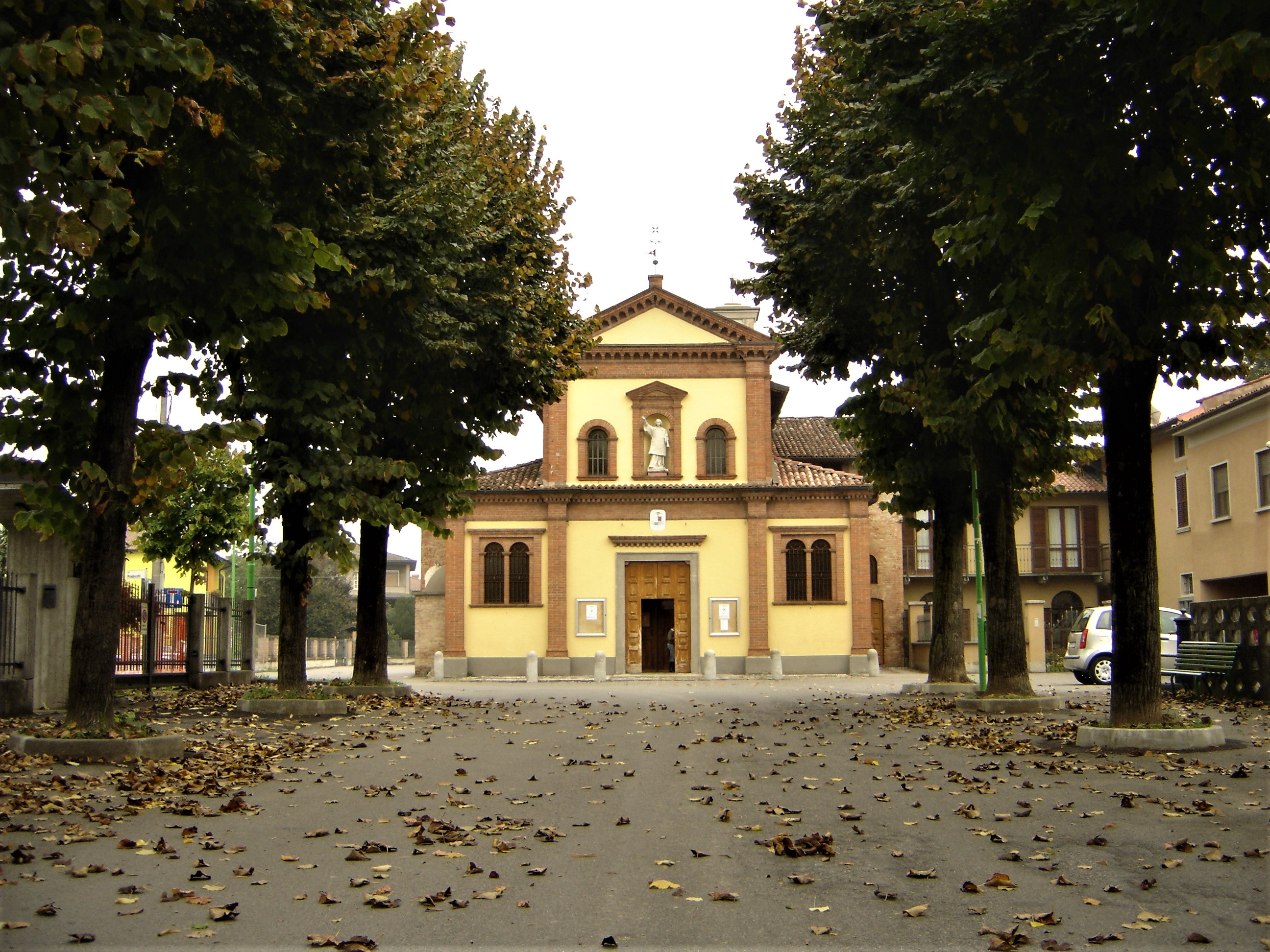 La Chiesa di Sola in fondo al viale con i tigli all'inizio dell'autunno.